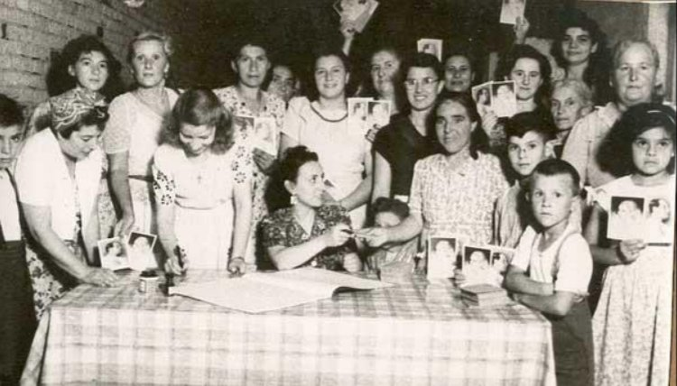 Ana Carmen Macri organizando el Partido Peronista Femenino en Tucumán en 1949. La Gaceta de Tucumán.